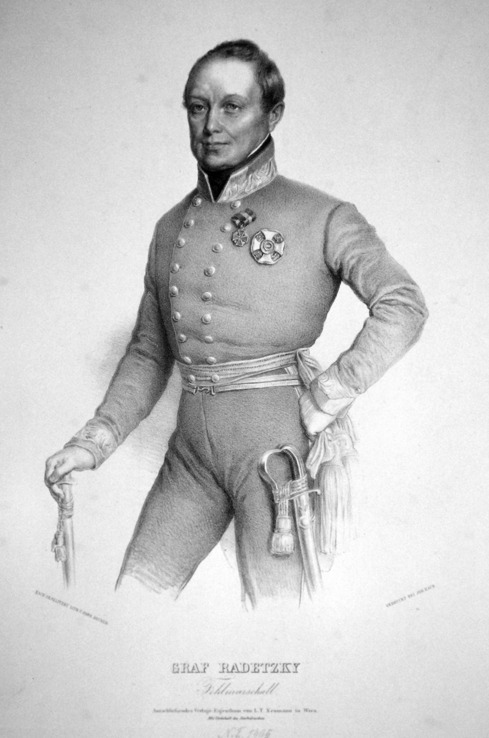 Josef Wenzel Radetzky von Radetz (1766-1858), österreichischer Feldmarschall.